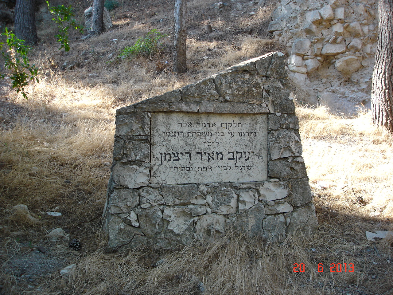 אבן זיכרון לכבודו של יעקב מאיר ריצ'מן שרכש אדמות באזור מצודת צפת ולאחר קום המדינה העביר חלק גדול מהן לעריית צפת, כולל בניין הכנסייה הסקוטית.